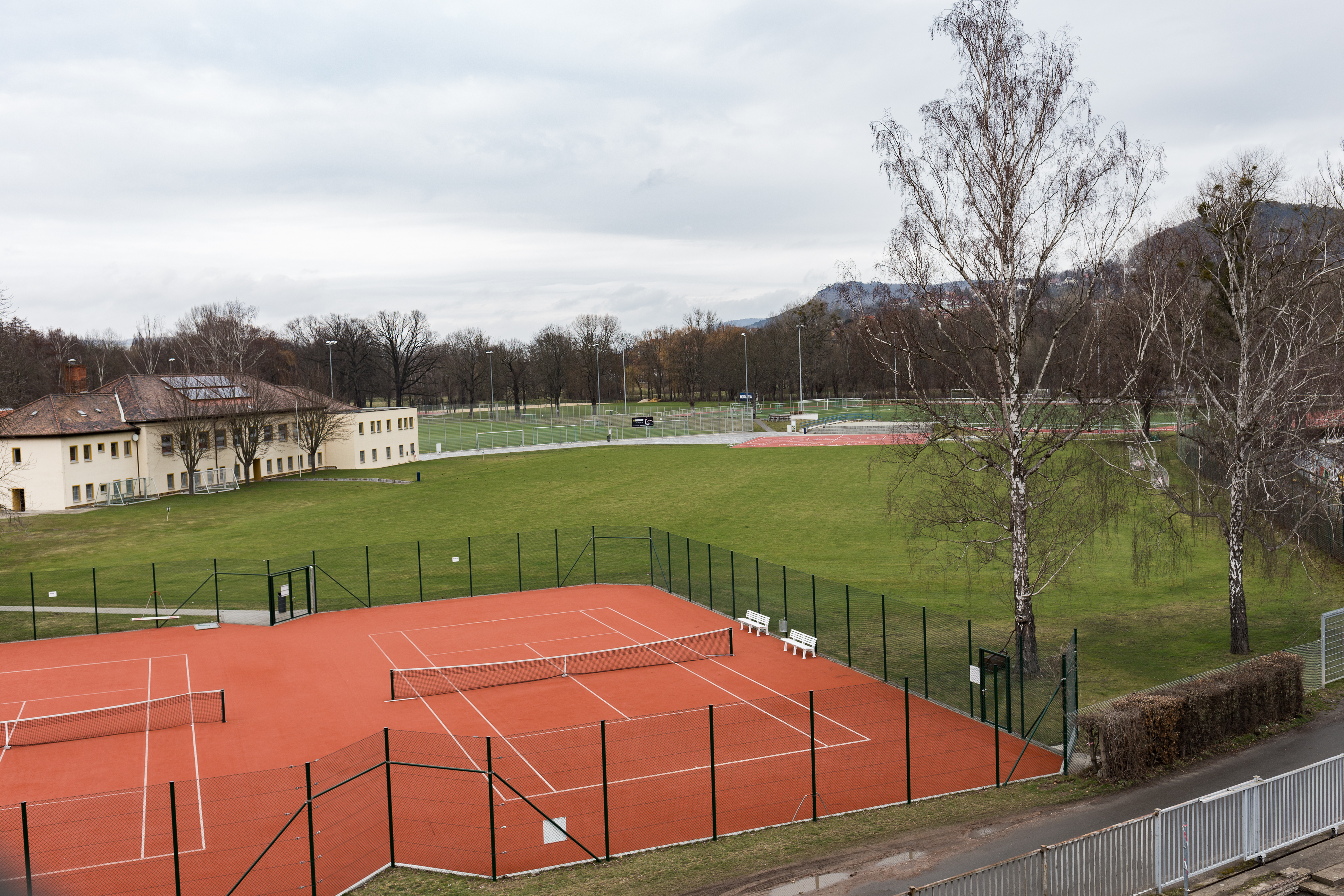 Blick über das Trainingsgelände des Universitätssportvereins (USV) Jena